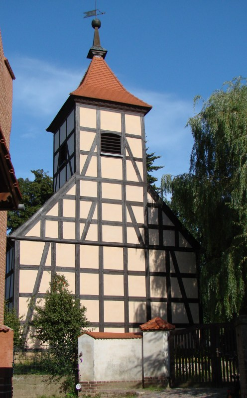 Dörfliche Fachwerkkirche im Ortsteil Bergholz-Rehbrücke; Denkmalschutz